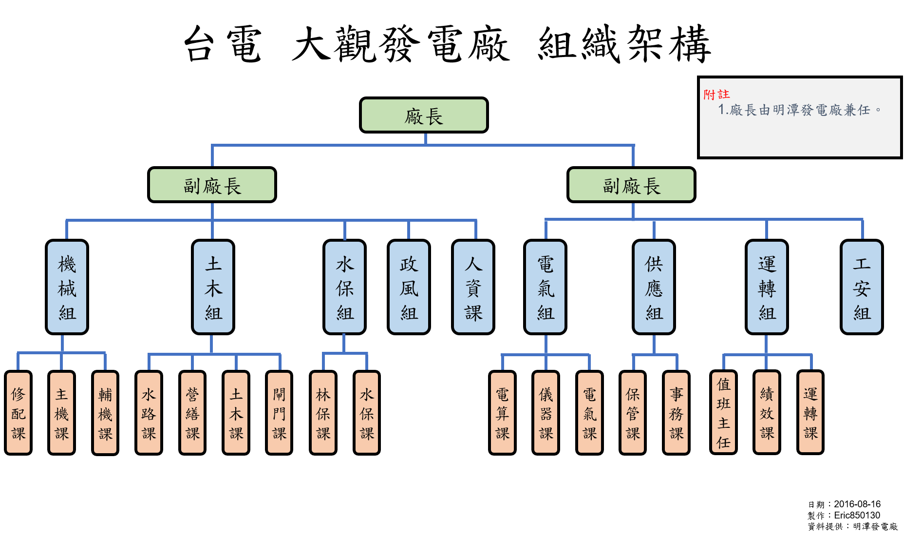 中文（台灣）: 台灣電力公司 大觀發電廠 組織架構